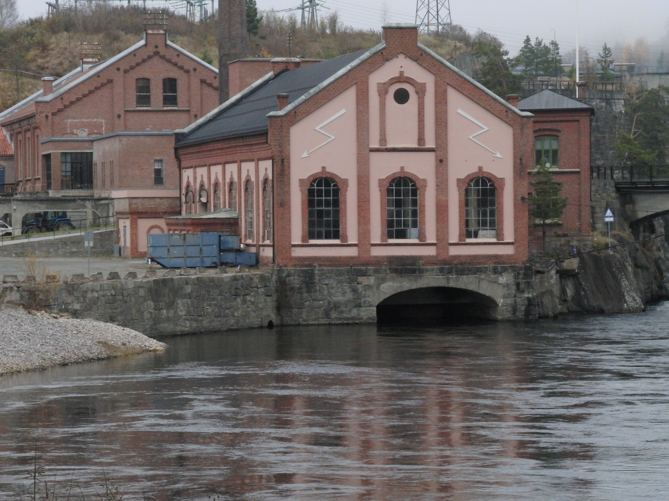 Tinfos I kraftverk (nedlagt)